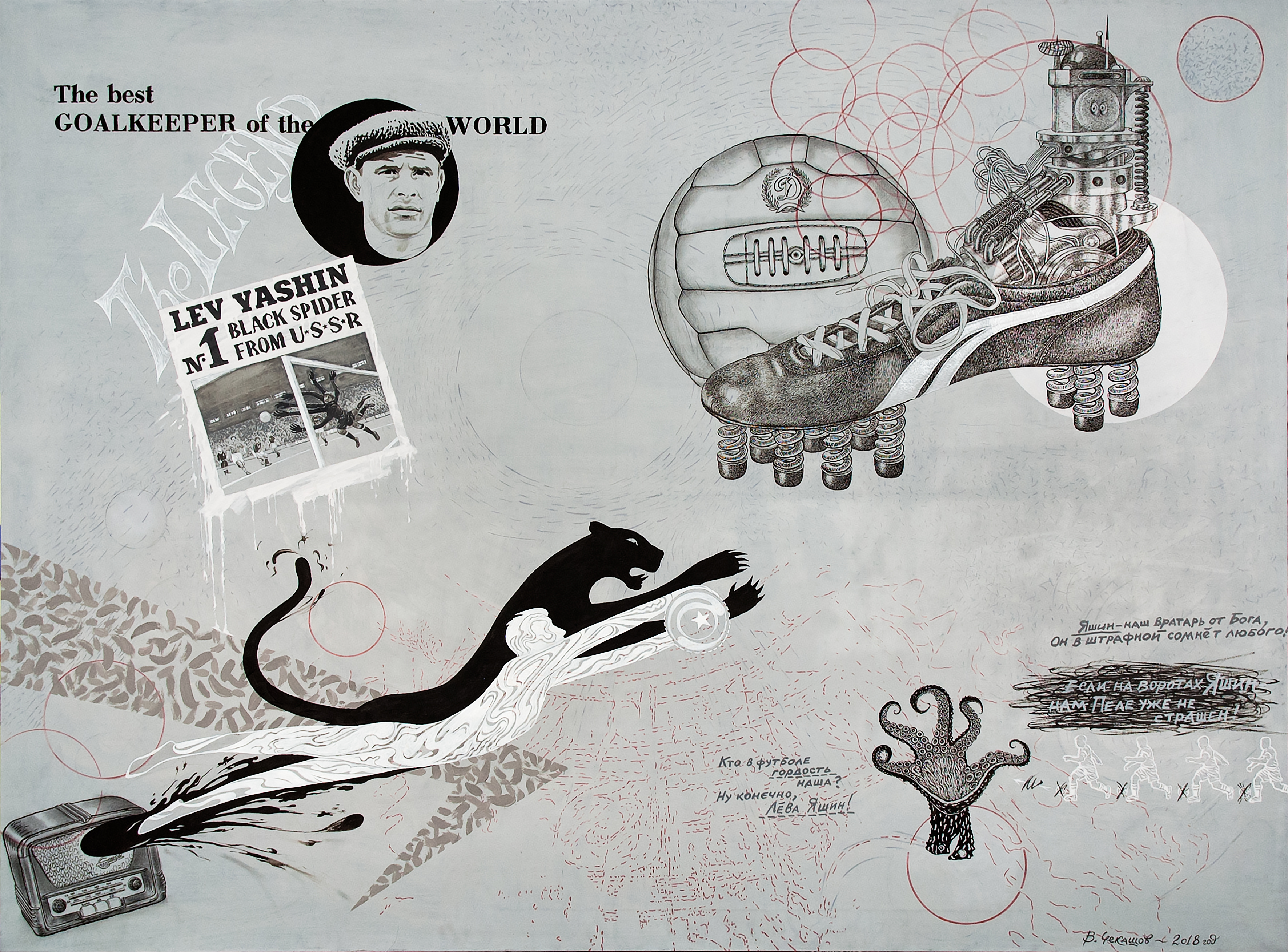 ЛЕВ ЯШИН. Холст, масло, 200Х150 см. 2018 г